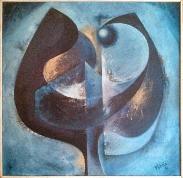 Obraz Miroslava Kostky dokončený v roce 1978 v Olomouci pod názvem Vesmírný přístav.